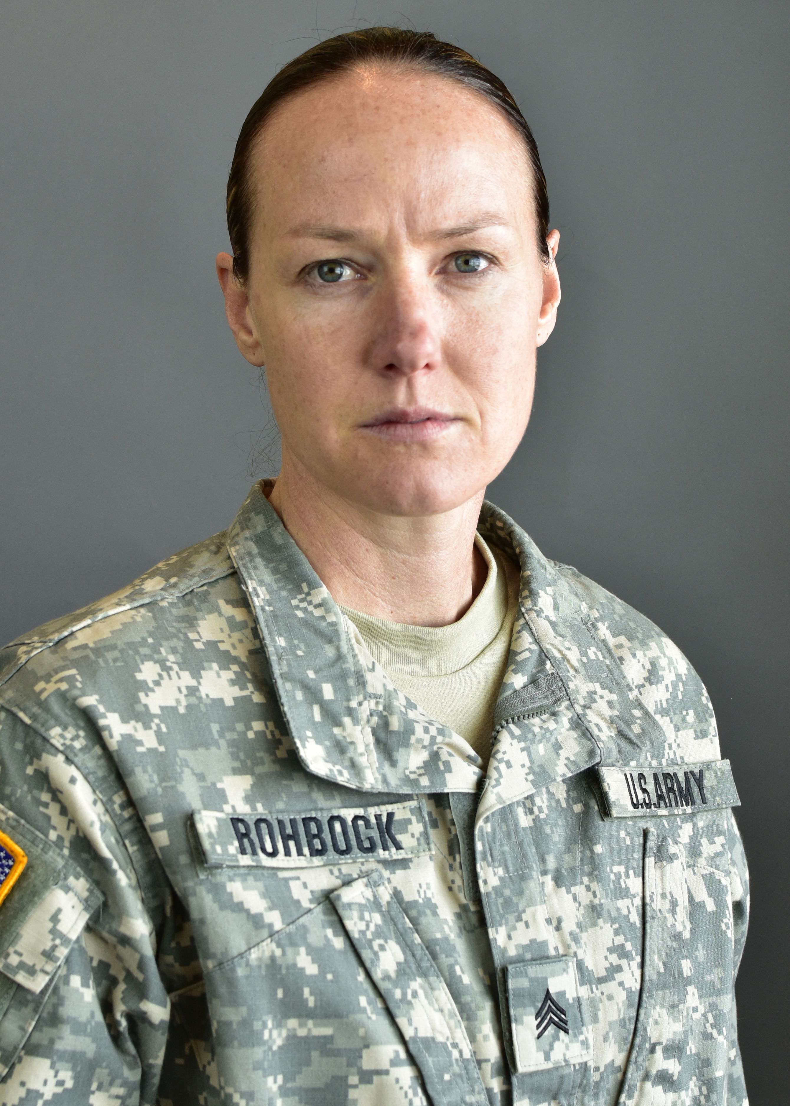 SGT SHAUNA ROHBOCK